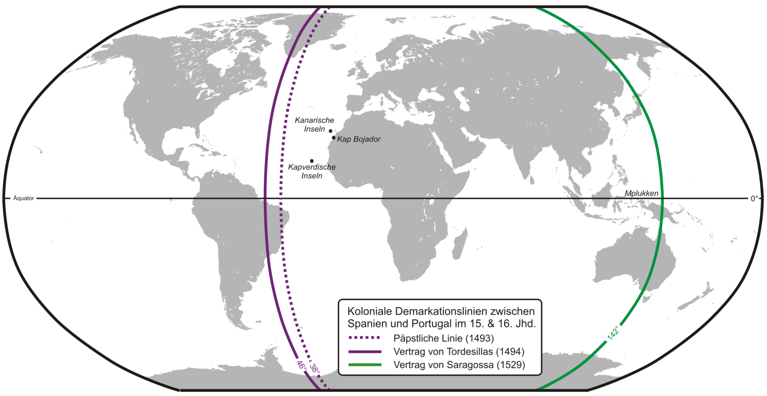 Karte der spanischen und portugiesischen Einflussbereiche nach den Verträgen von Tordesillas, Saragossa und Alcaçovas. Siehe auch: Begründung für die Saragossa-Linie